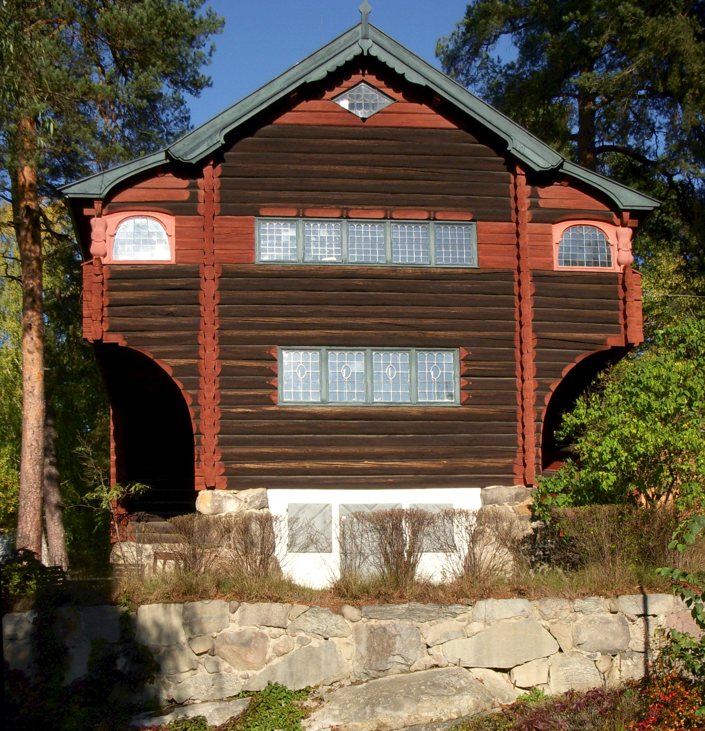 "Villa Tallom" i Stocksund, Danderyd